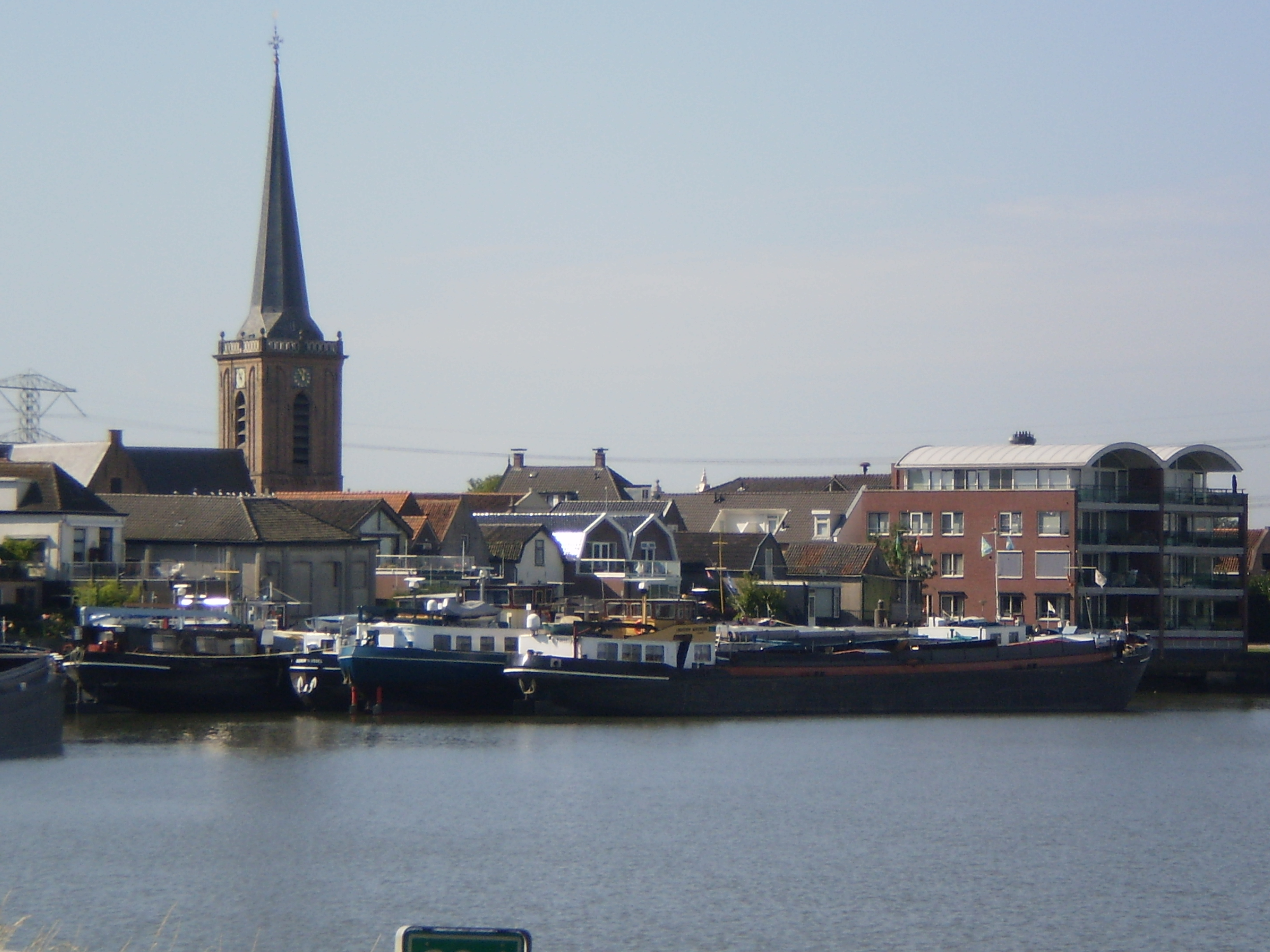 Ouderkerk oan de Isel. Foto oanbean troch Swarte Kees op 5 augustus 2009